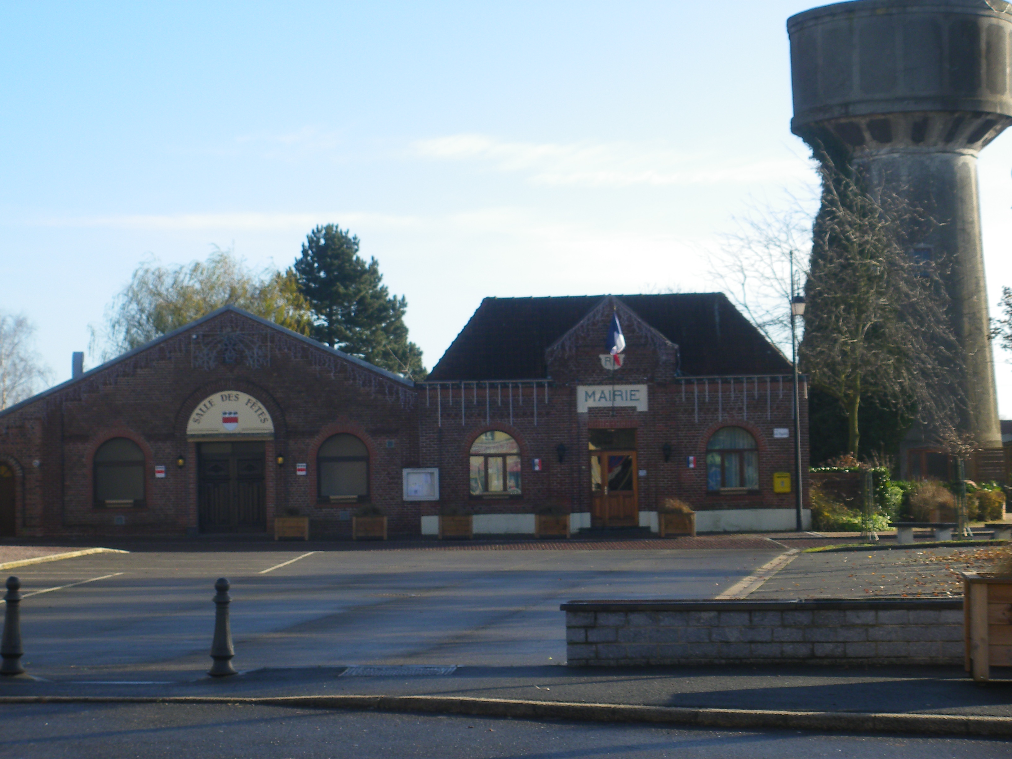 Vue de la mairie et de la salle des fêtes de Locon.